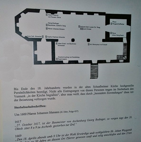 Verzeichnis der Epitaphien der alten im 19. Jahrhundert niedergerissenen Kirche mit historischen Kirchennotizen (Begräbnis Georg Ridinger, Baumeister Schloss Johannisburg in Aschaffenburg)